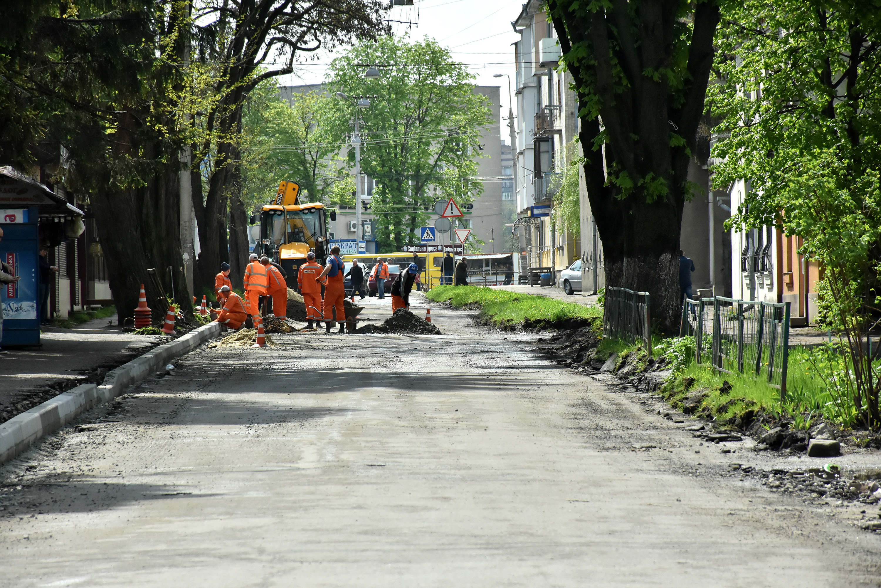 Ремонт вулиці Клінічної в Тернополі.